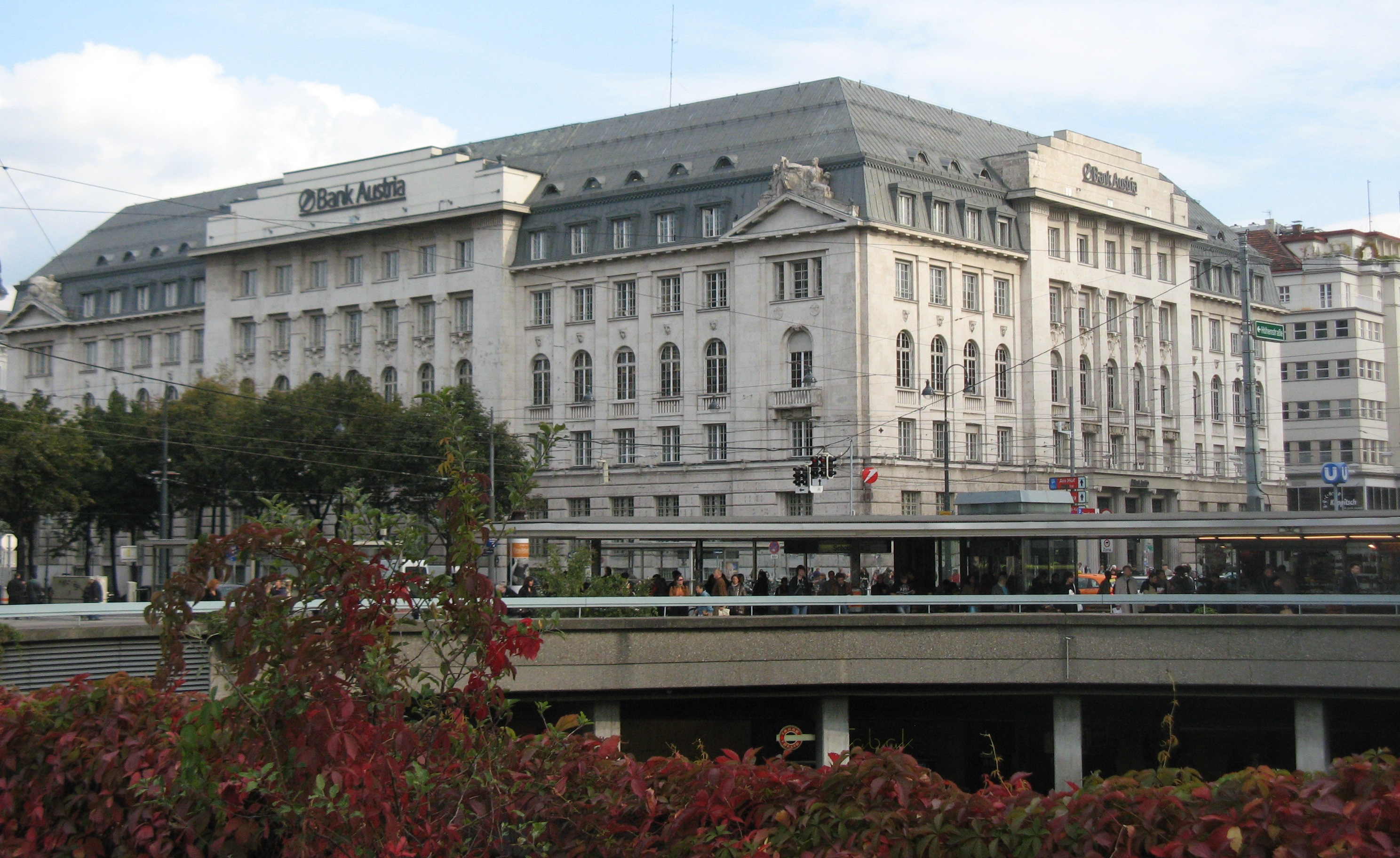 Ehemalige Creditanstalt-Bankverein (1909-12), Schottengasse 6-8, Wien-Innere Stadt